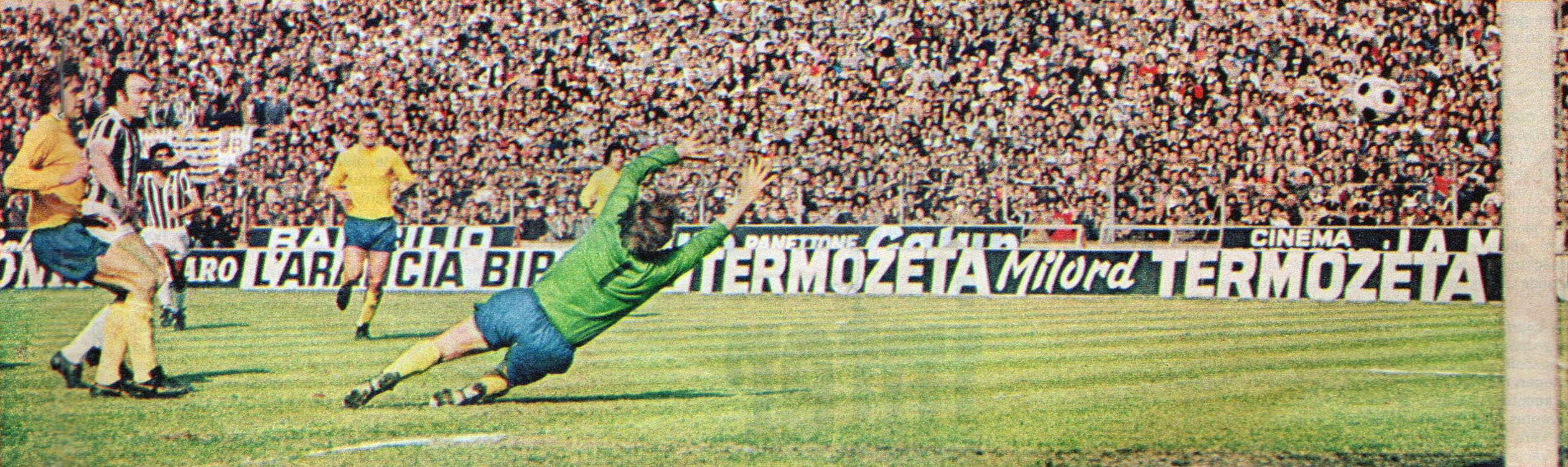 Torino, stadio Comunale, 11 aprile 1973. L'attaccante dei Bianconeri José Altafini (a sinistra) batte il portiere dei Rams Colin Boulton (a destra) e realizza uno dei suoi due gol nel corso della sfida tra Juventus e Derby County (3-1) valevole per la semifinale di andata della Coppa dei Campioni 1972-73; nell'occasione la squadra ospite indossò la sua divisa di cortesia gialloblù.